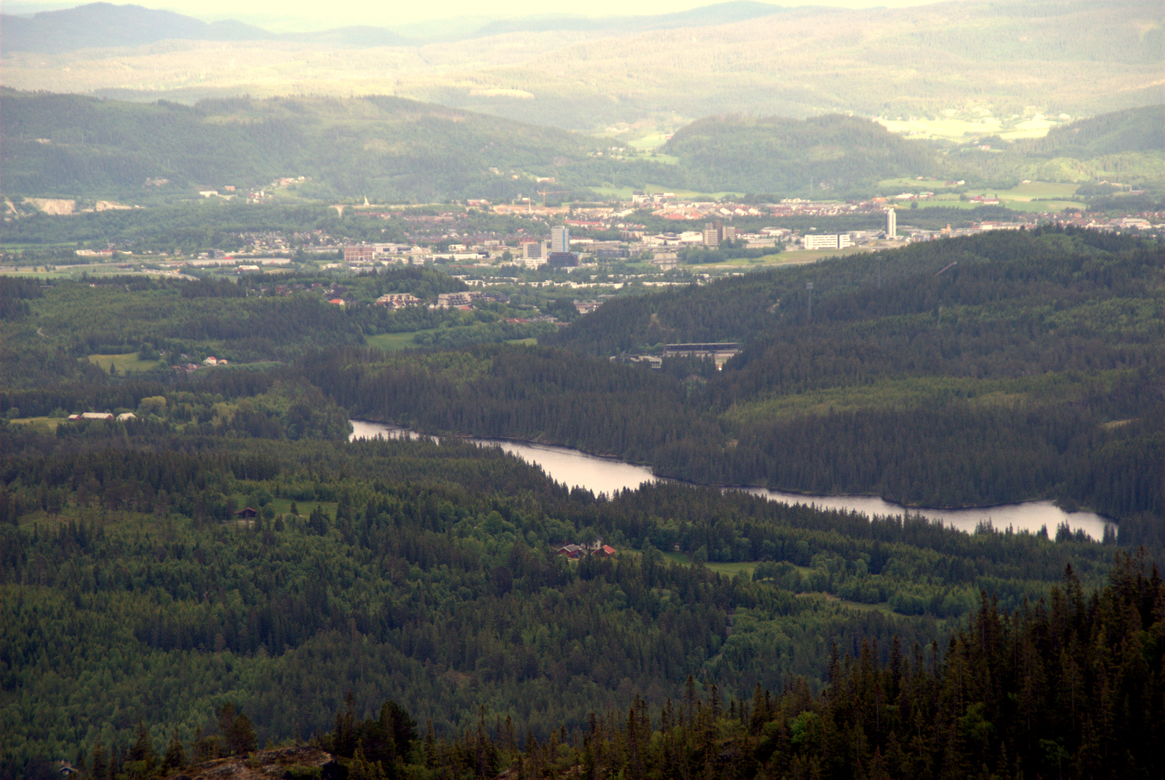 Store Leirsjøen med Tillerbyen og Klæbu i bakgrunnen. Bilde tatt fra Storheia i Bymarka i Trondheim.